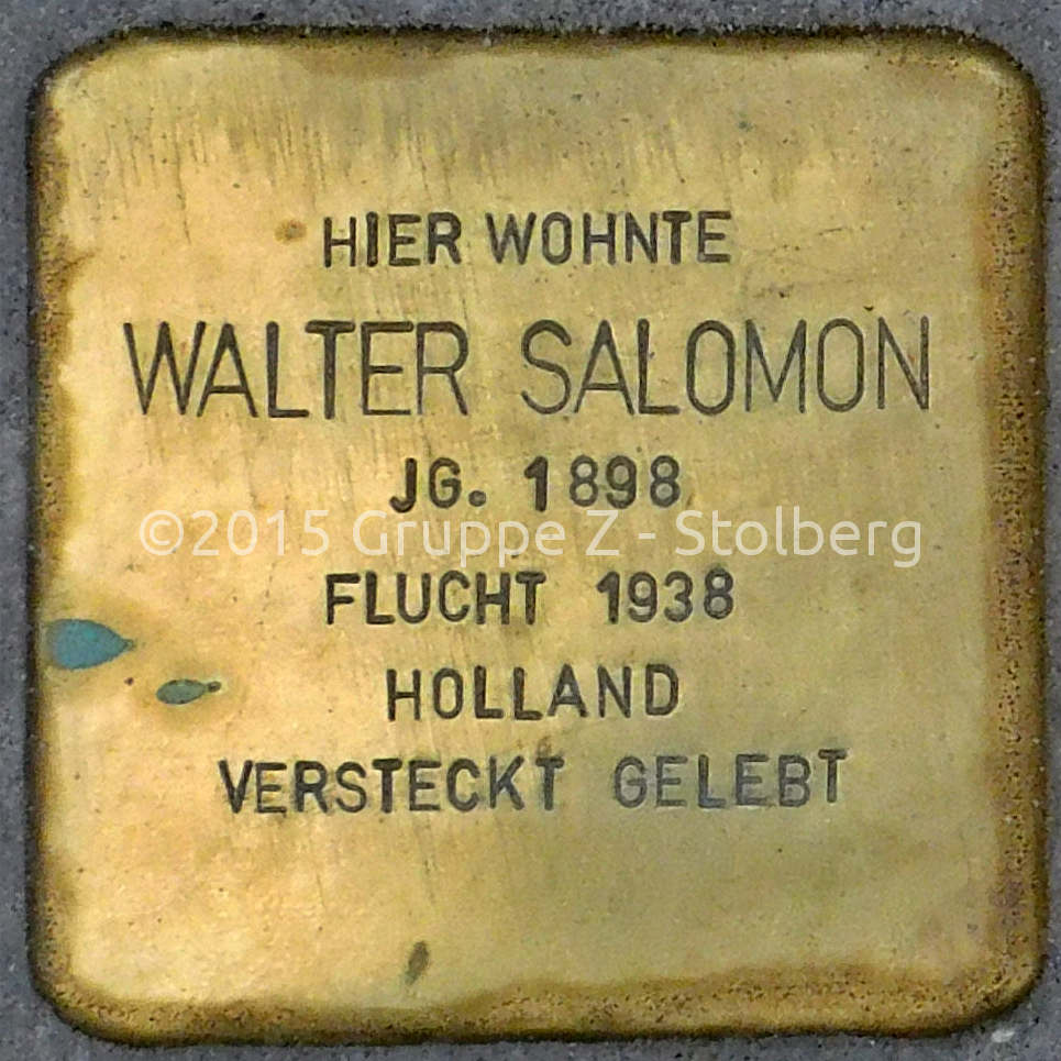 Stolperstein für Walter Salomon verlegt am 18. Dezember 2015